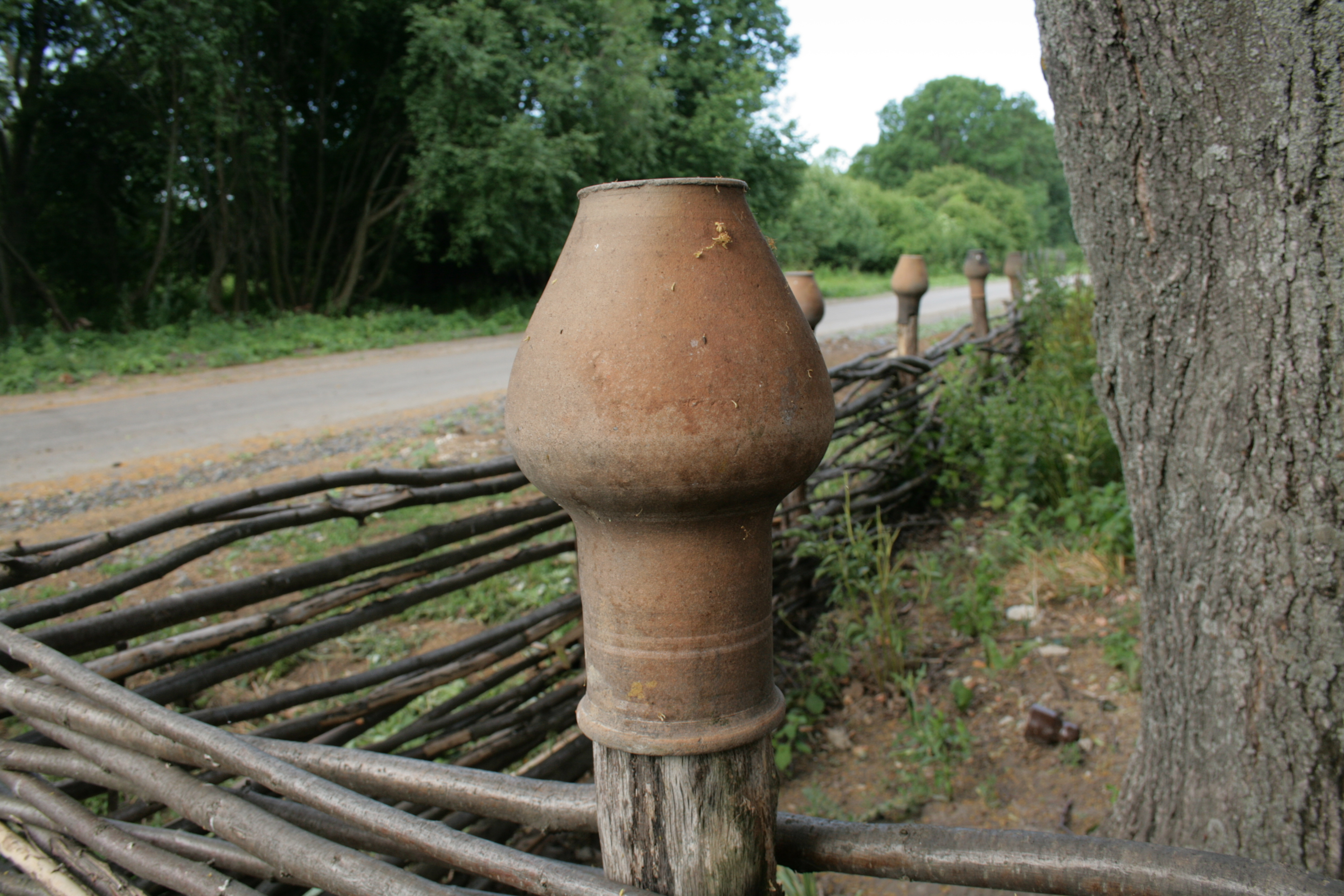 1-й Белгородский областной фестиваль экопоселений и родовых усадеб «Хутор мой родной». Хутор Новая заря Шебекинского района Белгородской области. 2013